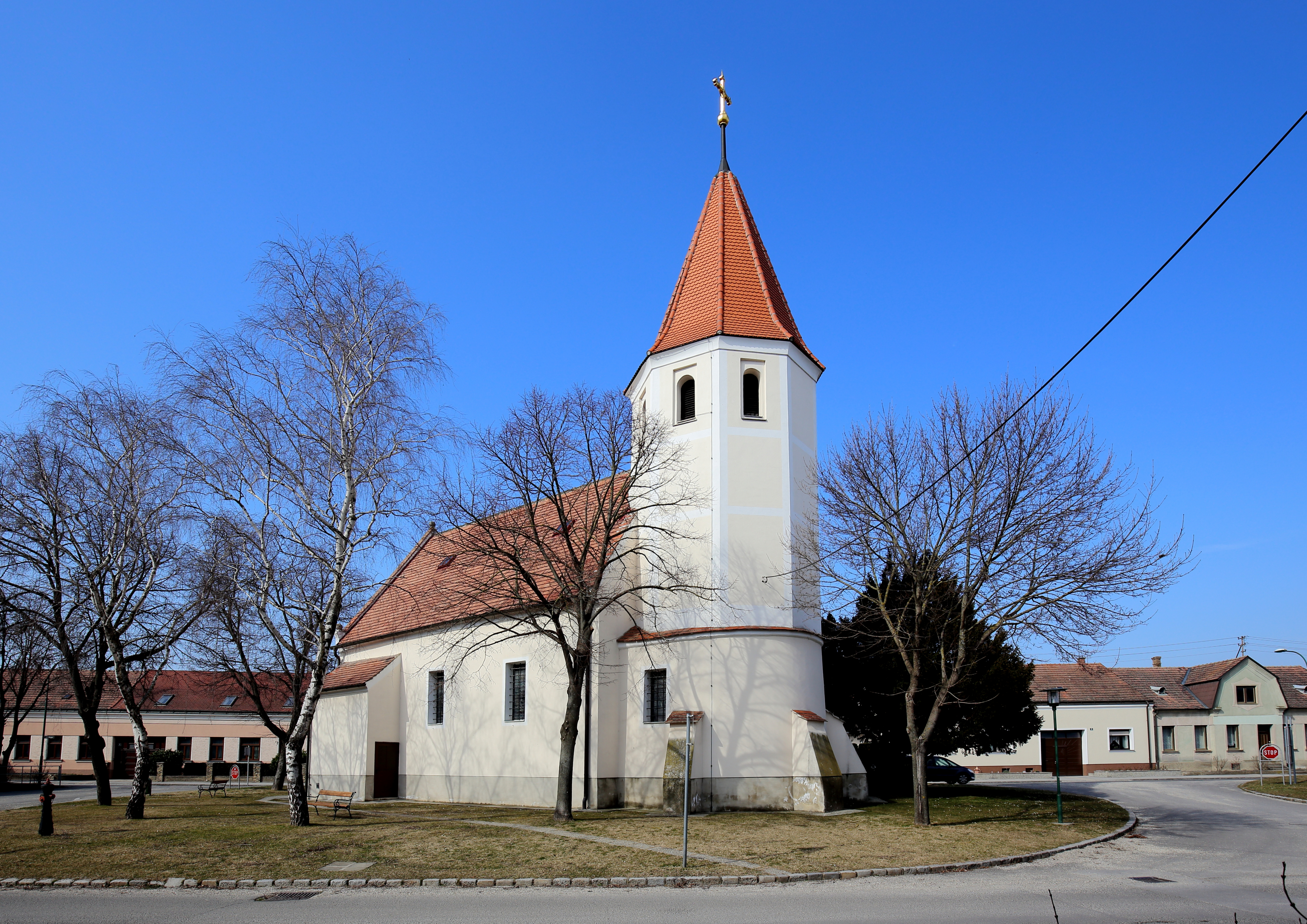 Südostansicht der katholischen Pfarrkirche hl. Anna in Breitstetten, ein Ortsteil der niederösterreichischen Marktgemeinde Leopoldsdorf im Marchfelde. Das Langhaus hat einen spätromanischen Kern und wurde unter Beibehaltung des spätromanischen Rundchores 1713 barockisiert. Der achteckige Ostturm über dem Chor wurde 1807 und die barocke Sakristei im 18. Jahrhundert errichtet.